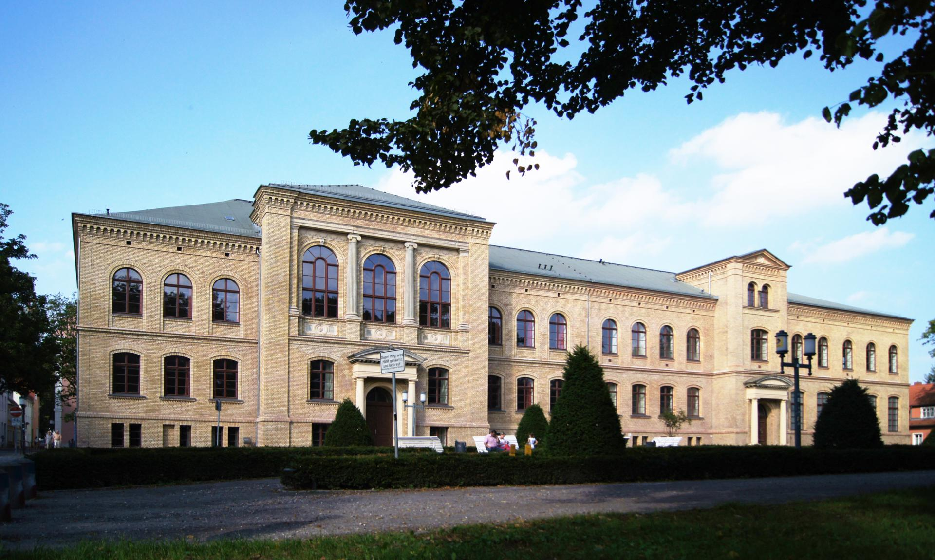 Friedrich- Ludwig- Jahn Gymnasium, Haus II. Ehemalige August-Bebel-Schule.